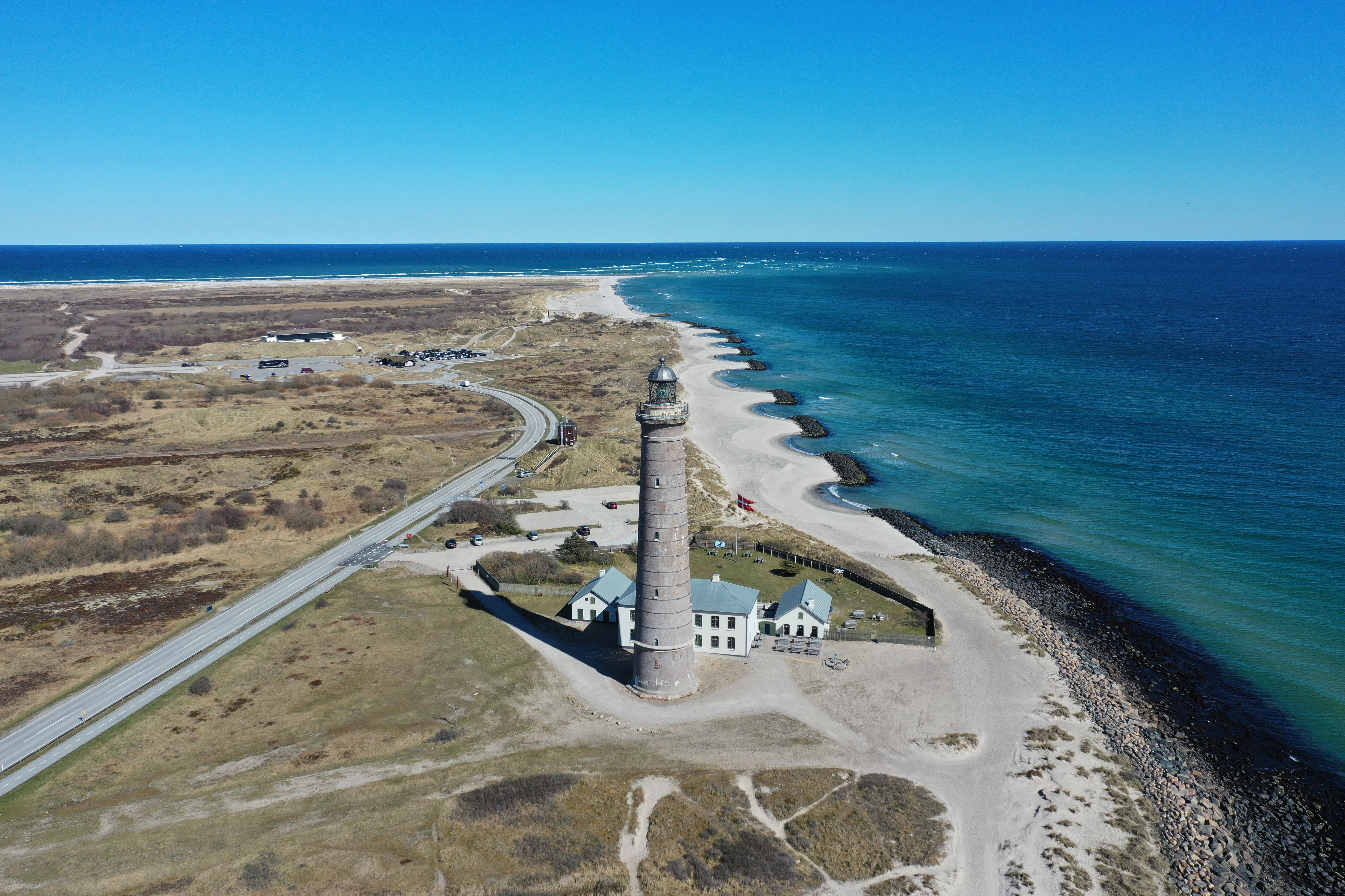 Det Grå Fyr og Grenen